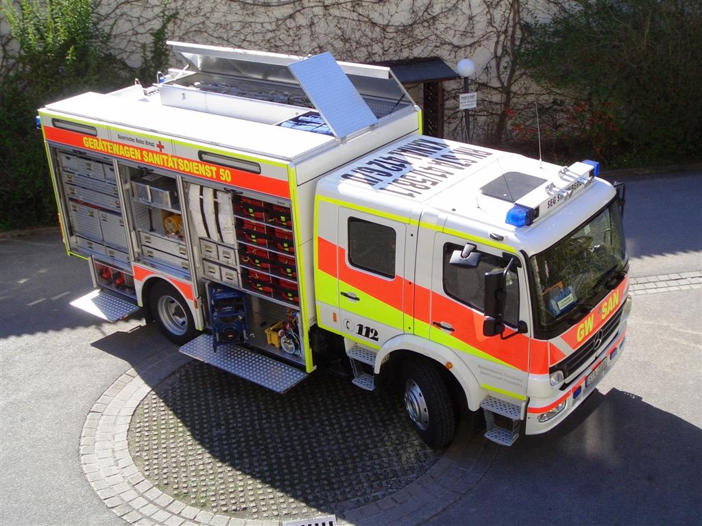 Gerätewagen Sanitätsdienst (GW-San50) des Landkreises Starnberg. Ein Projekt des gemeinnützigen Katastrophenschutz e.V. zusammen mit dem Landkreis Starnberg (Bayern) und dem BRK-Starnberg. Er wurde 2006 in Dienst gestellt. Er ist Bestandteil des Sanitätszuges der 1. SEG Sanitätsdienst im Landkreis Starnberg (SEG-SÜD). Er ist ausgerüstet, um bei einem MANV (Massenanfall von Verletzten) und/oder im Katastrophenfall eine große Anzahl von Verletzten im Schadengebiet zu versorgen. Er führt das gesamte Material mit, was zum Aufbau und Betrieb eines Behandlungsplatzes (BHP50) zur Versorgung von 50 Patienten jeglicher Verletztenkategorie pro Stunde benötigt wird. Nähere Infos auf der Homepage des Katastrophenschutz e.V. - Verein zur Optimierung von Rettungswesen und Katastrophenschutz ( und den Seiten der 1. SEG-SAN Landkreis Starnberg (SEG-SÜD) unter Weitere ähnliche Begriffe für solche Fahrzeuge sind: Gerätewagen Rettungsdienst (GW-Rett), GW-MANV, Gerätewagen Behandlung (GW-BEH), Gerätewagen Versorgung (GW-Versorgung). In der Version als Abrollgehälter lauten die Kurzversionen: AB-San, AB-BEH, AB-Rett